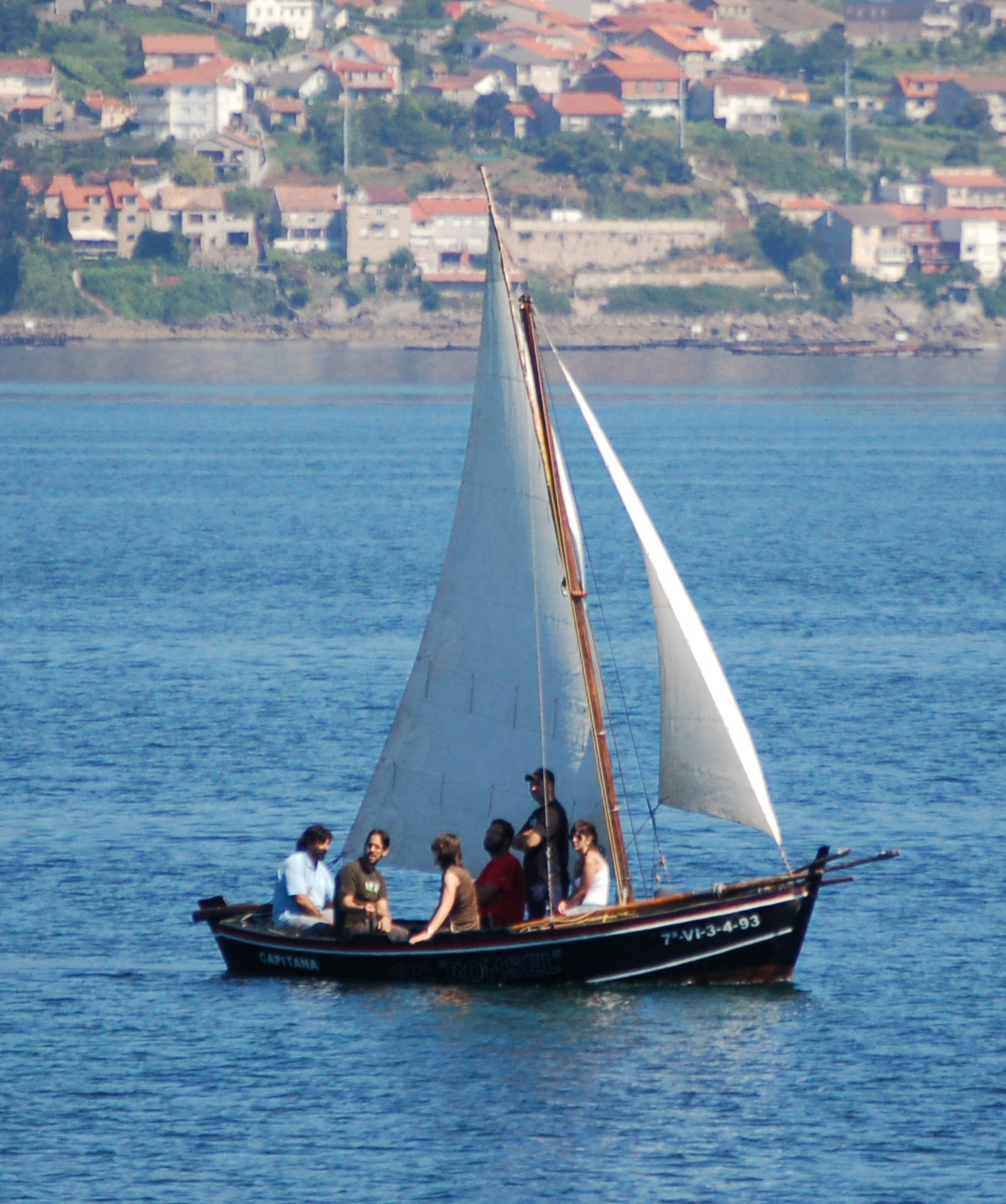 Dorna navegando a vela xunto ao peirao de Aguete (ría de Pontevedra)